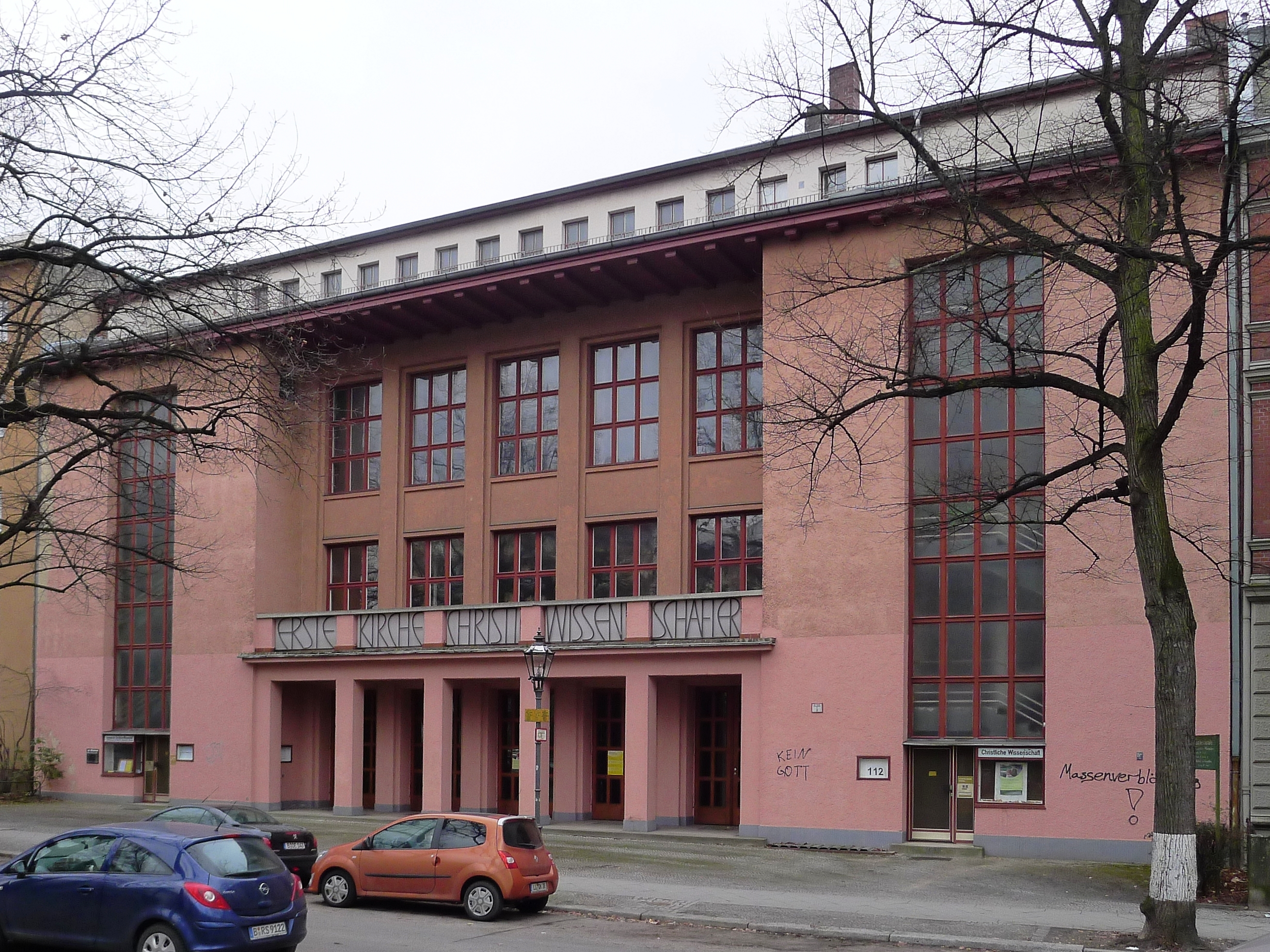 Eingang zum Vorraum der Kirche hinter der Arkade im Mittelteil des Vereinsgebäude